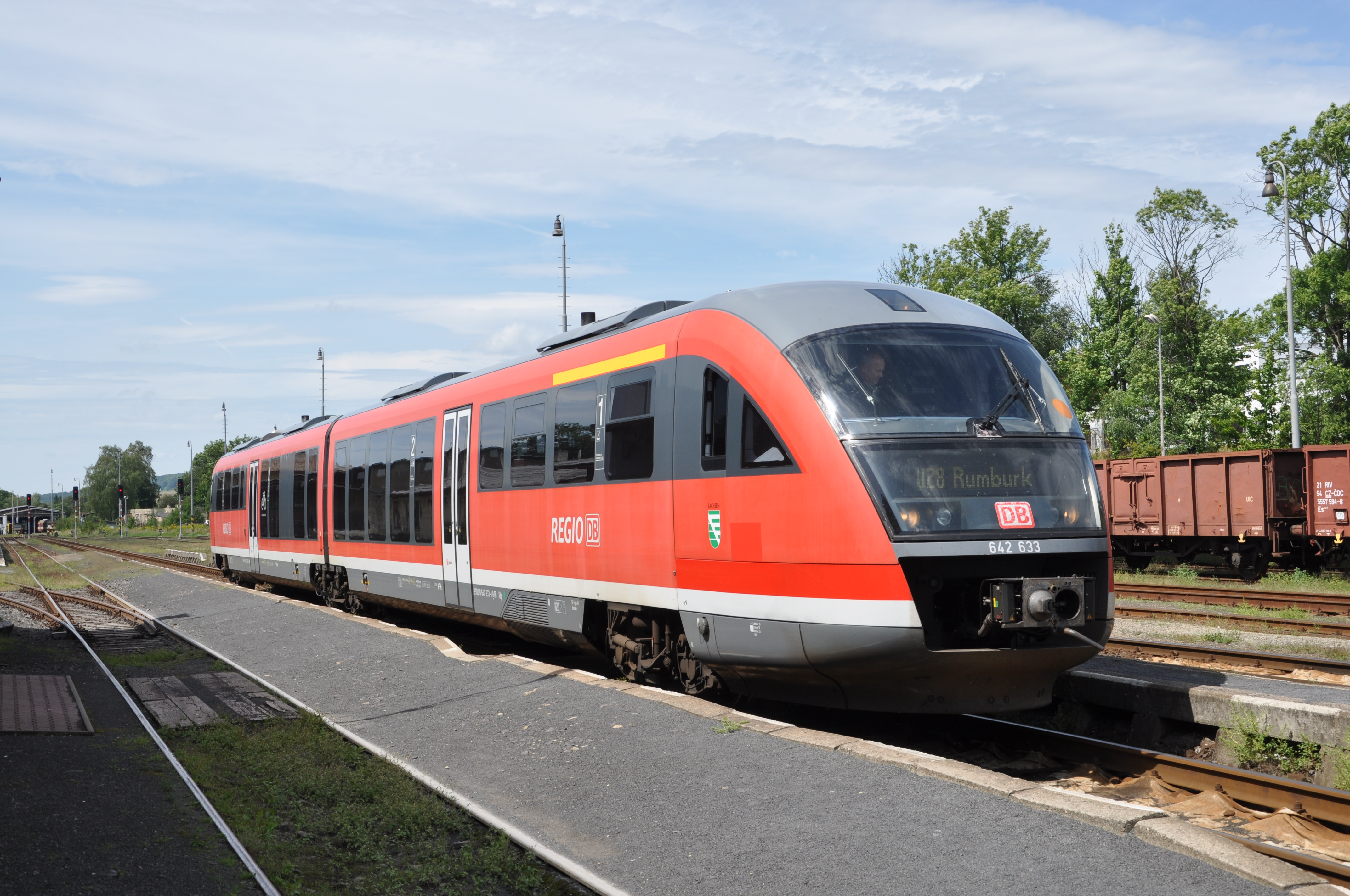 Reisezug der Linie U28 im Bahnhof Rumburk